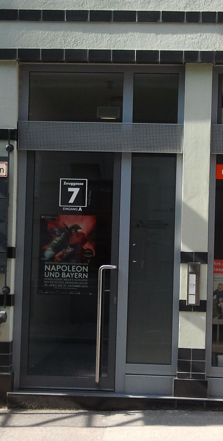 Fassade des Hauses der Bayerischen Geschichte.